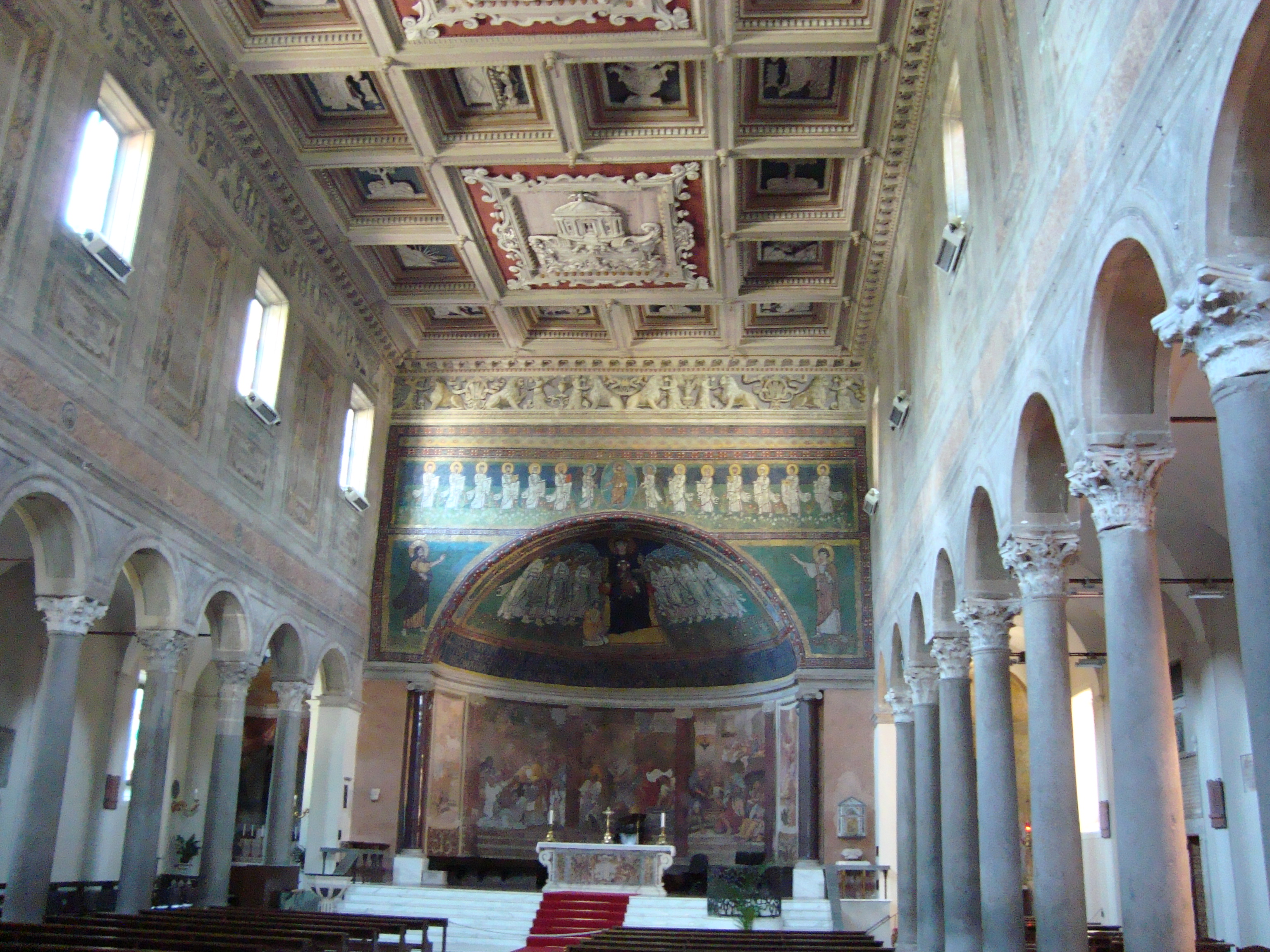 Intérieur de la basilique Santa Maria in Domnica